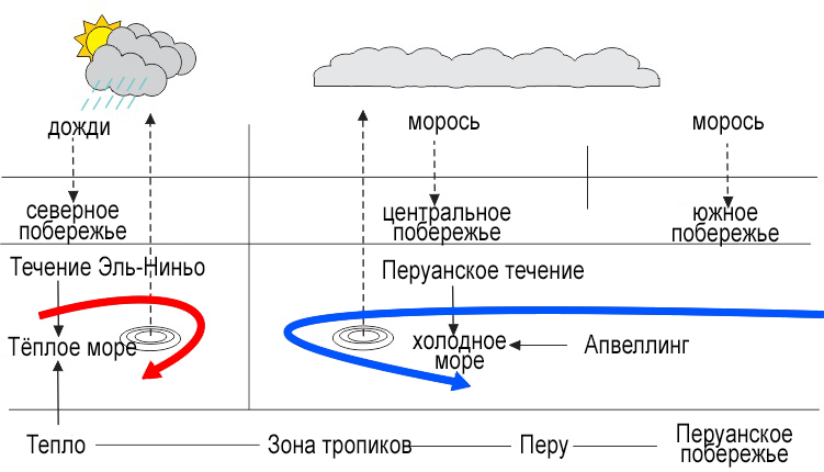 Влияние морскиъ течений на климат Перу